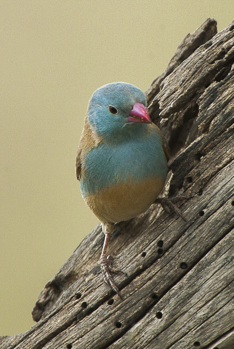 Blue-capped Cordonbleu - Ndutu - Tanzania_0184